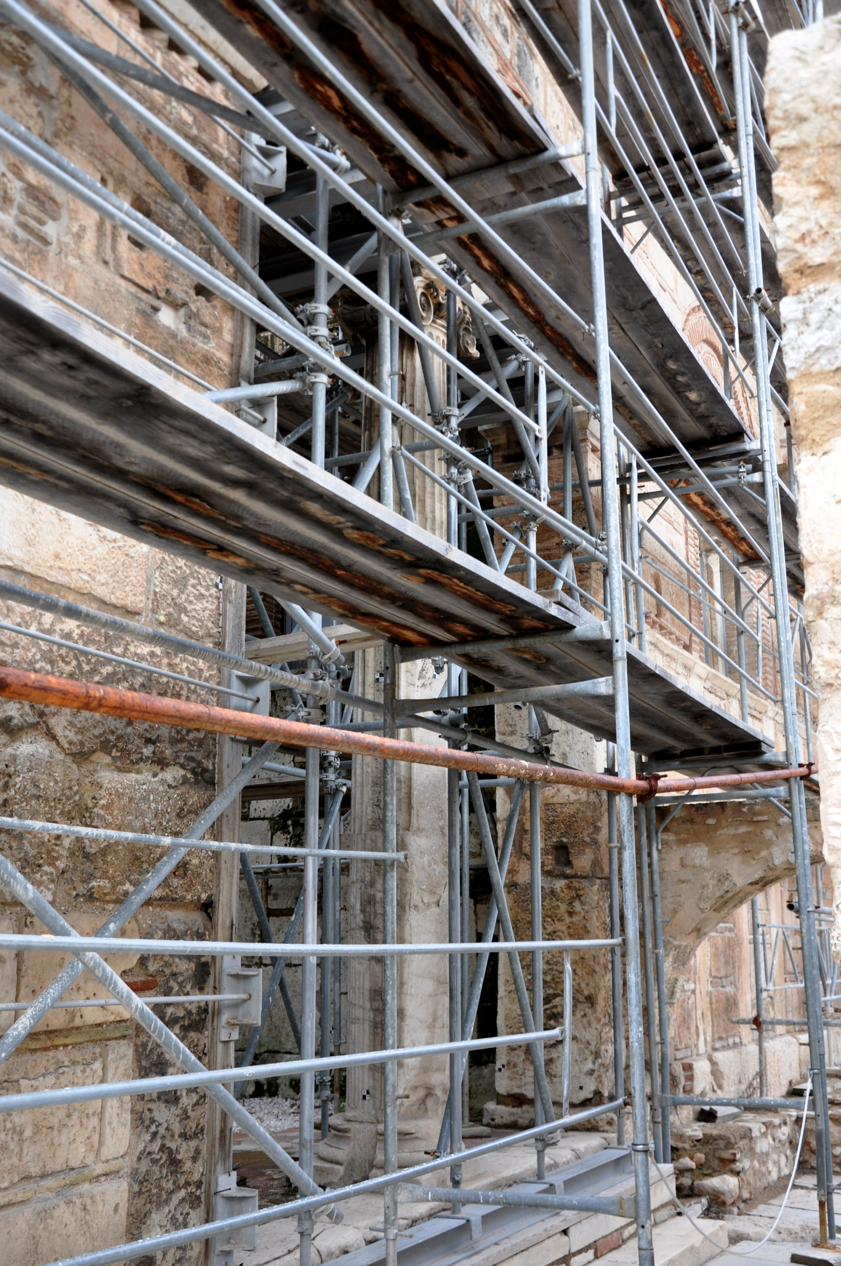 Klasztor Dafni, obrzeża Aten. Ostatnia, nie wywieziona przez Lorda Elgina kolumna świątyni Apollona. W tytule pliku błędnie opisana, jako koryncka. Ta przetrwała, mocno uwięziona w murach monastyru. A może wandal zostawił ją na pamiątkę, jako swój podpis, że tu był ? W każdym bądź razie niegdyś było tu więcej...